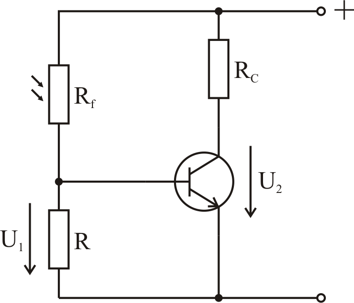 Schéma zapojení fotorezistoru